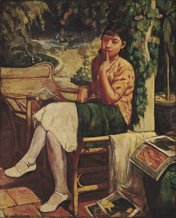 中文（台灣）: 李梅樹常常畫自己的子女或親族好友，除了方便之外，就是多了一分親切感。《小憩之女》所畫的便是侄媳婦劉曾妹(哥哥劉清港之子劉山田的太太)。 一位二十多歲的少婦，坐在躺椅上休息，姿態優雅，著絲襪及高跟鞋，左手食指輕點朱唇，彷彿訴說著青春年華的種種氛圍，令人欣賞！前景有西洋名家雷諾瓦、梵谷的畫片，背景營造出深度的空間感。 《小憩之女》一作獲得1935年第九屆臺灣美術展覽會特選第一席，並榮獲臺展賞最高榮譽。